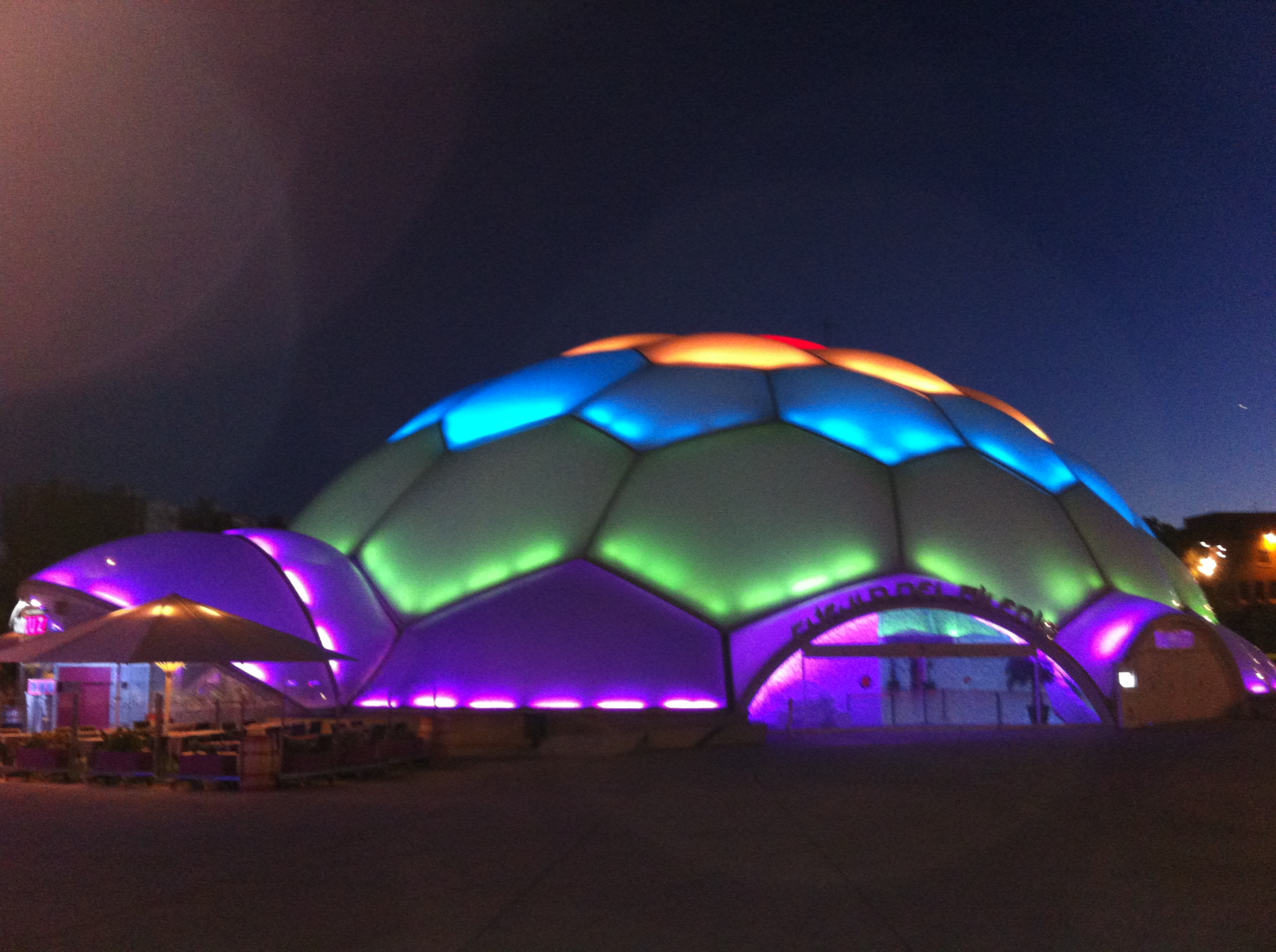 Cúpula del Milenio de la ciudad de Valladolid.